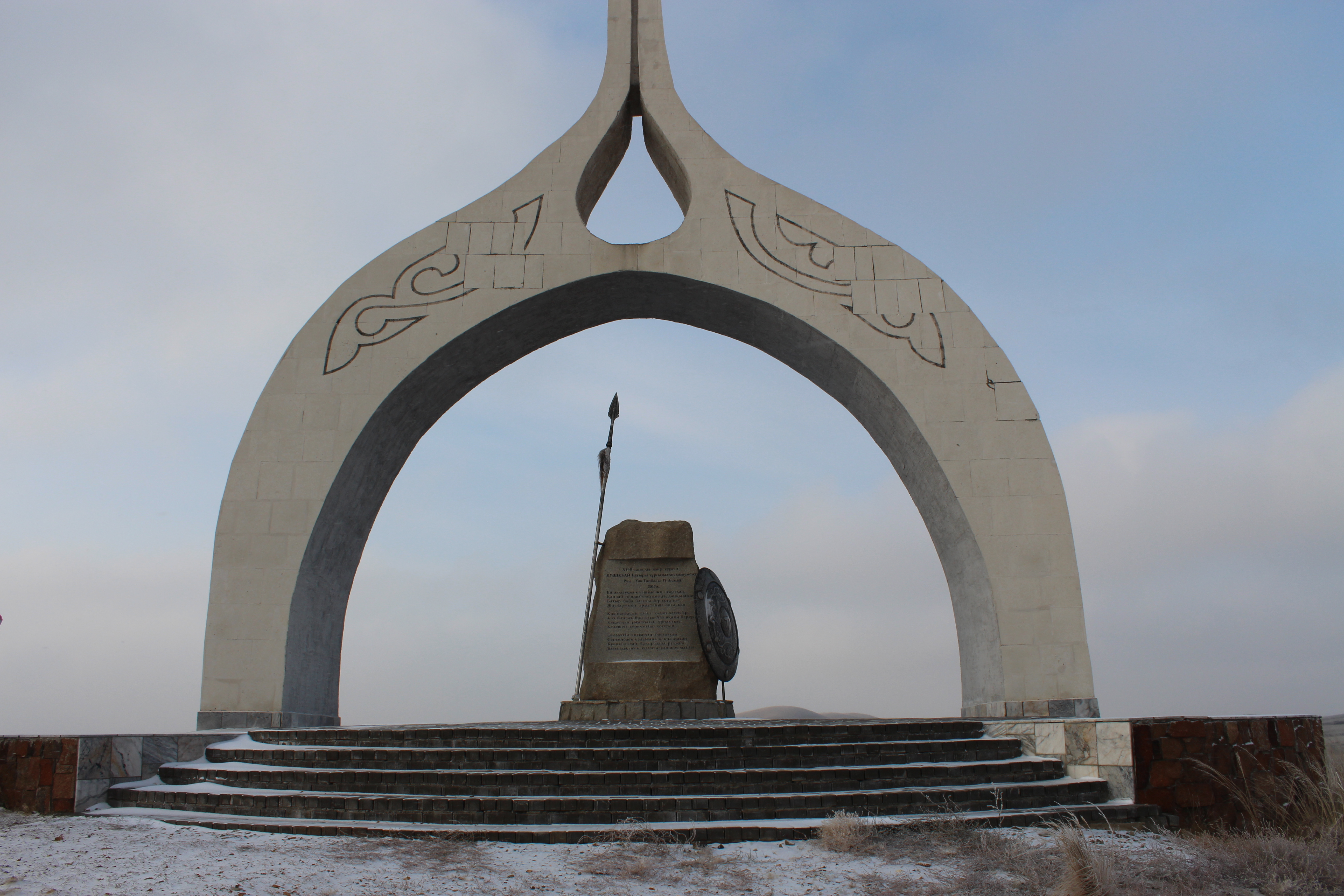 Қазақша (кирил): Күшікбай батыр ескерткіші